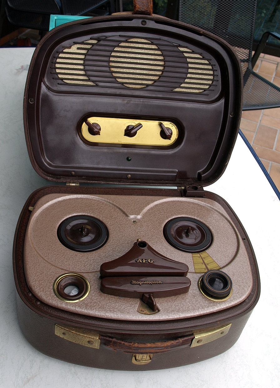 AEG Magnetophon KL-15 (Hauptbetriebsartenwahlschalter nicht original)